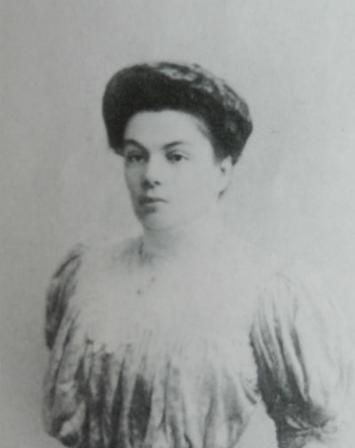 Мария Илларионовна Мусина-Пушкина, ур. Воронцова-Дашкова (1871—1927)